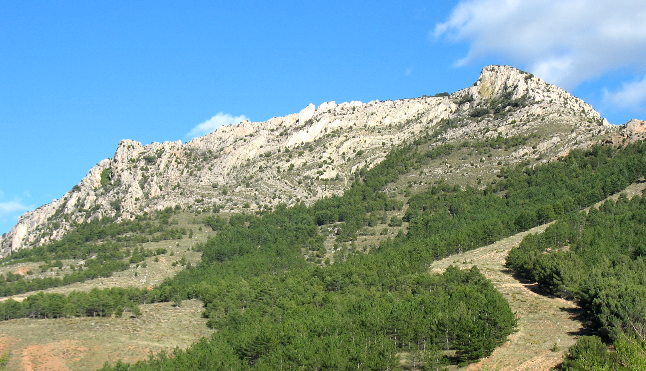 Anticlinal tumbado del frente del "Cabalgamiento de Utrillas" (Cretácico superior sobre Cenozoico) N-420, entre Utrillas y Montalbán (Teruel, España)